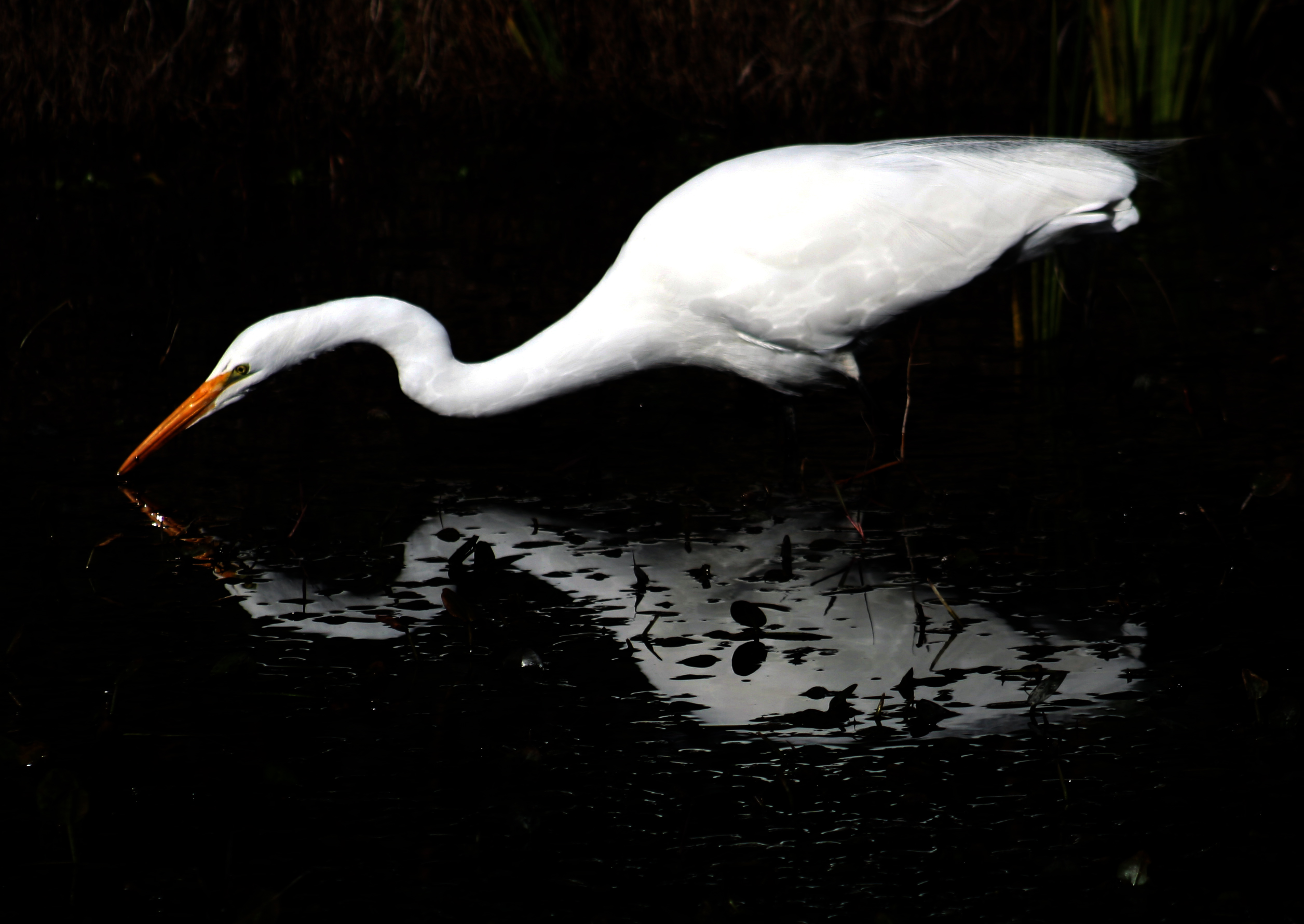 Great Egret, Ardea alba